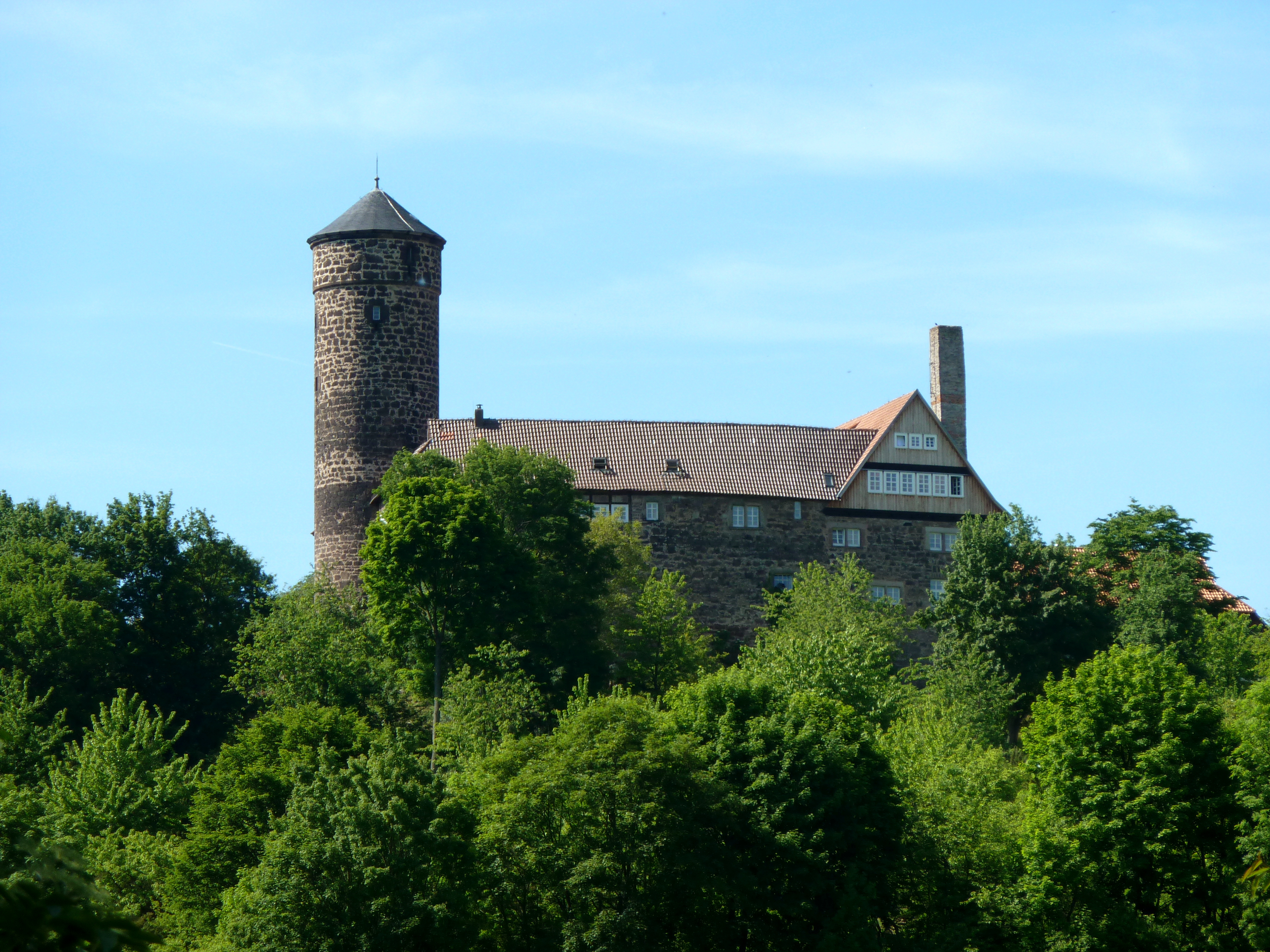 Blick von Südosten auf Burg Ludwigstein